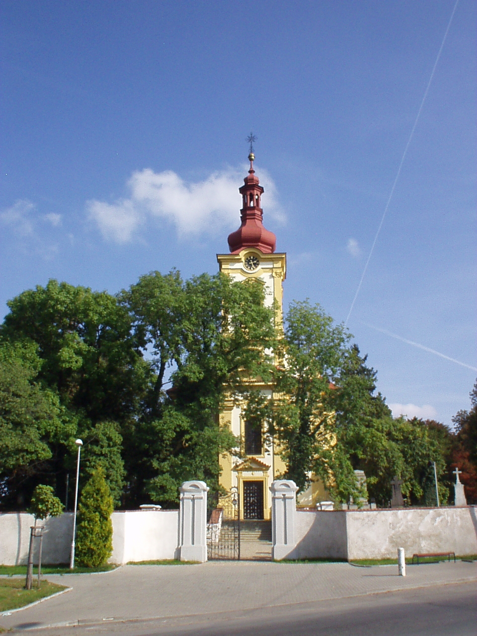 Česky: kostel sv. Martina z Tours v Líbeznicích